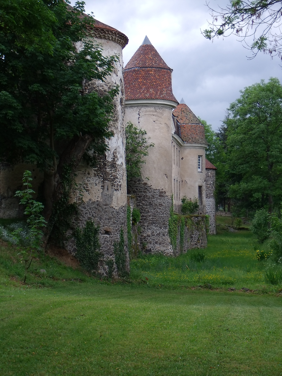 château de Goutelas (commune de Marcoux), façade nord sur la vallée (ancien fossé en eau comblé).